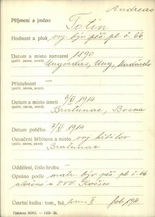 картка з ввйськового архіву Праги, Товтин Андрій з Вовкове (Унгордаш)